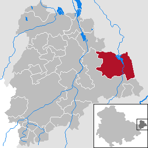 Langenleuba-Niederhain in Thuringia - District Altenburger Land